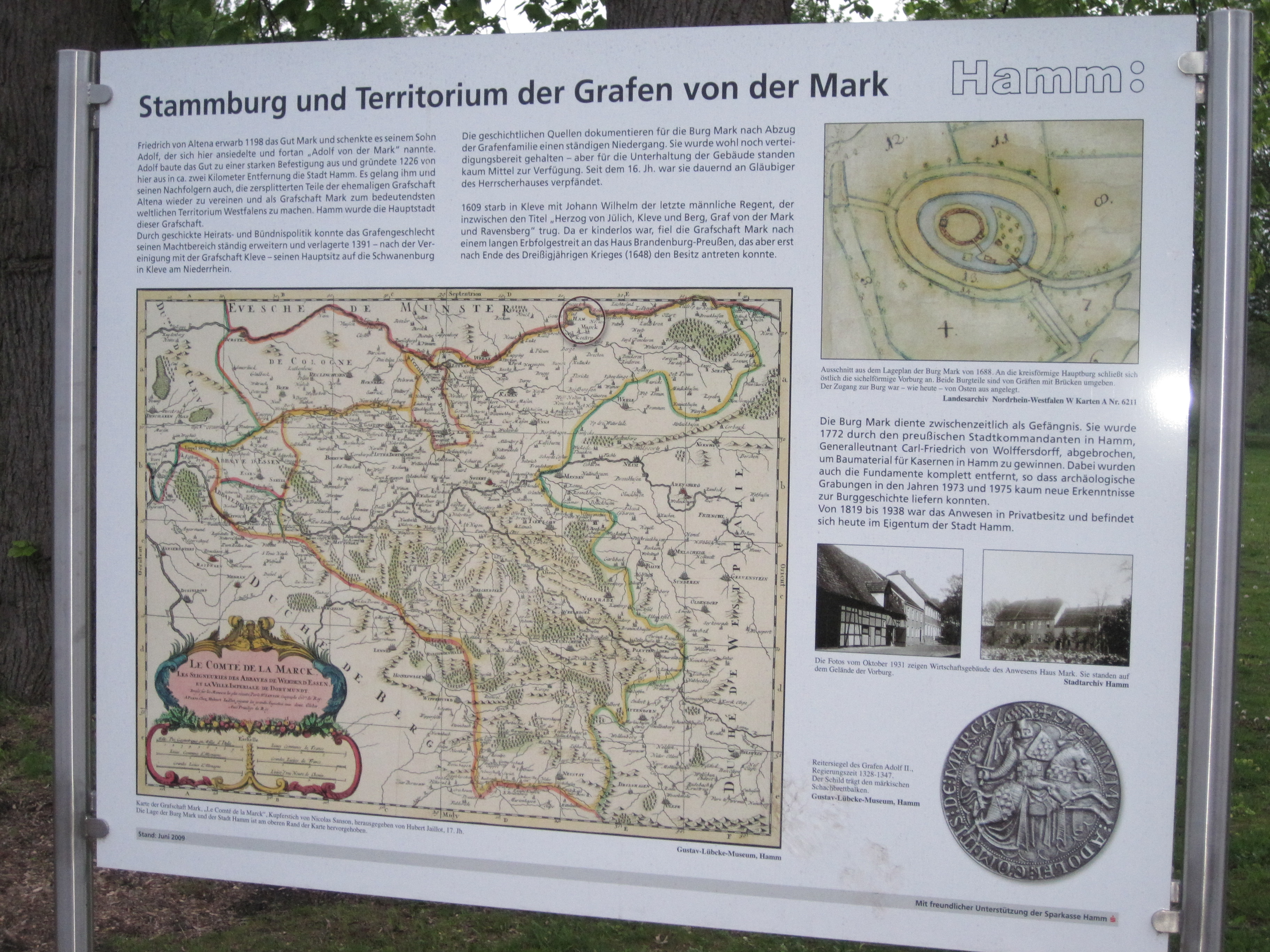 Dieses Foto zeigt eine Informationstafel auf dem Burghügel in der Mark zu Hamm.